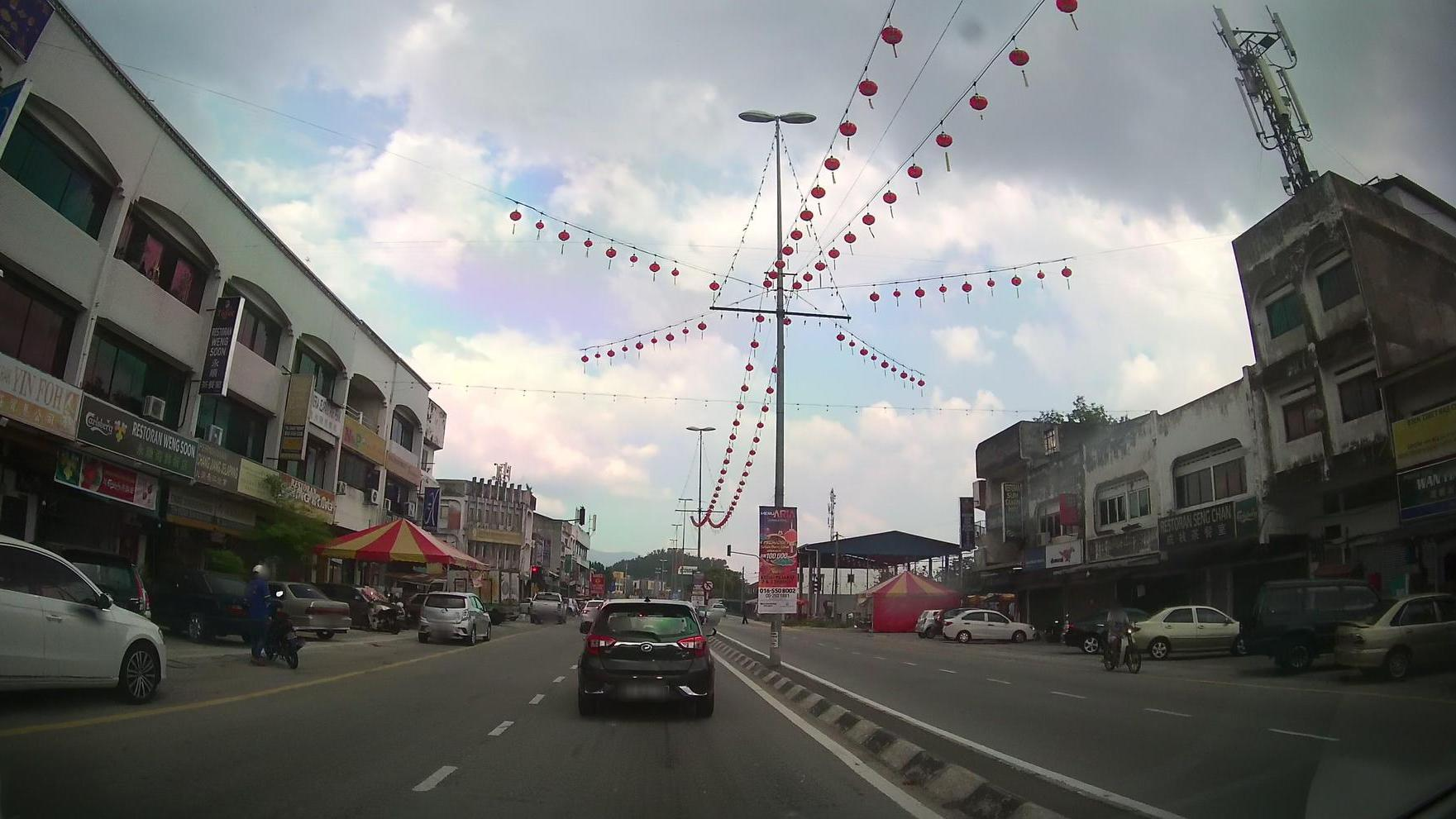 Jelapang main street view